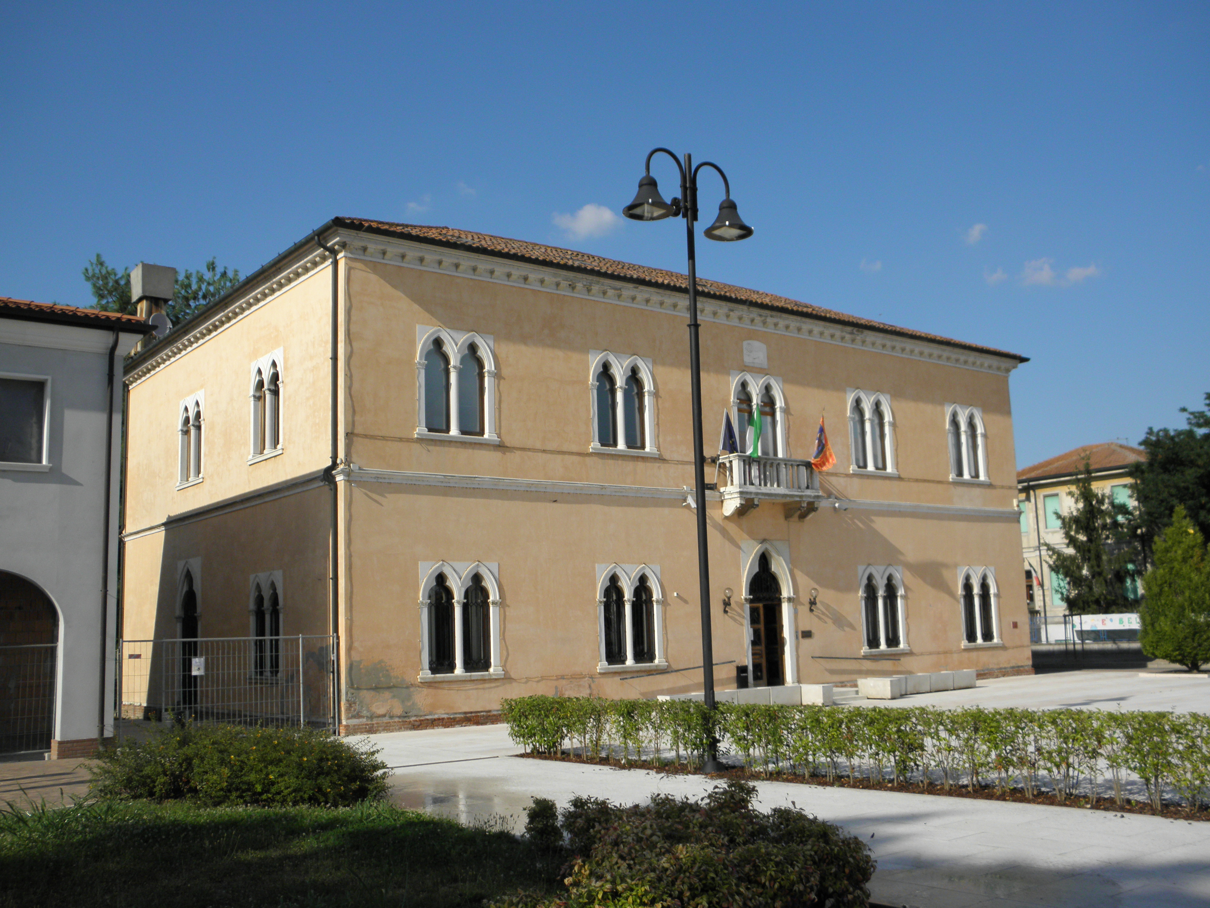 Ceregnano: il Palazzo Municipale.